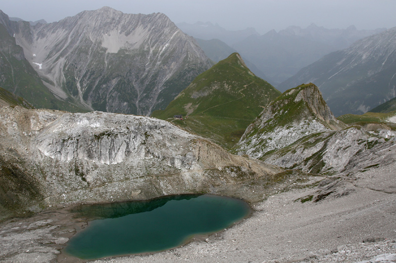 Blick zurück zur Memminger Hütte